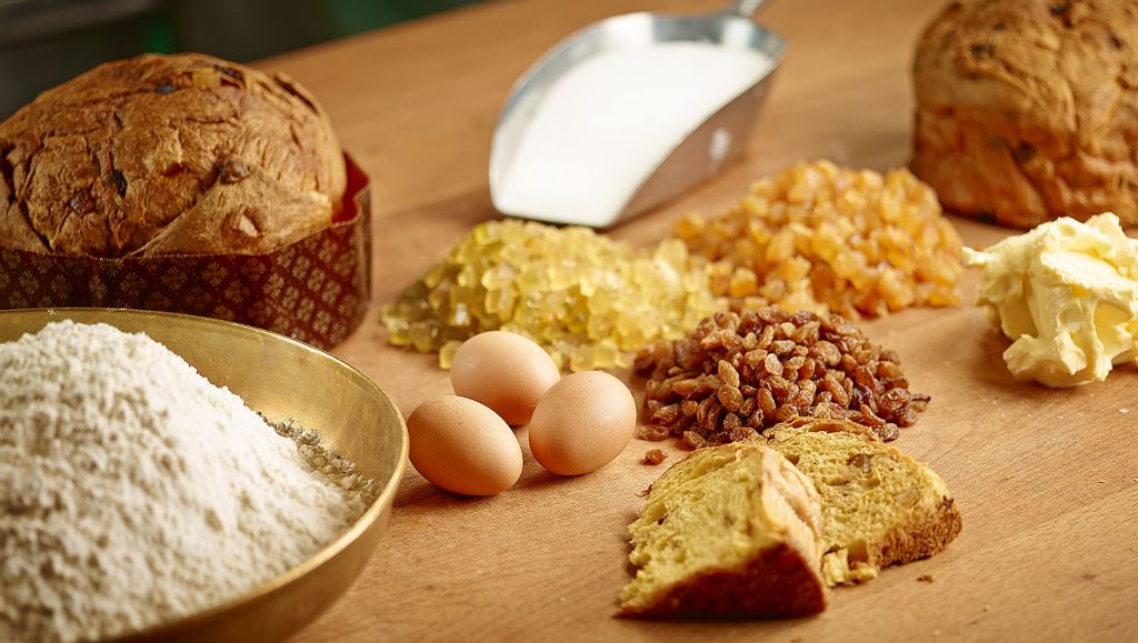 farina, lievito madre, burro, tuorli, zucchero, canditi e uvette